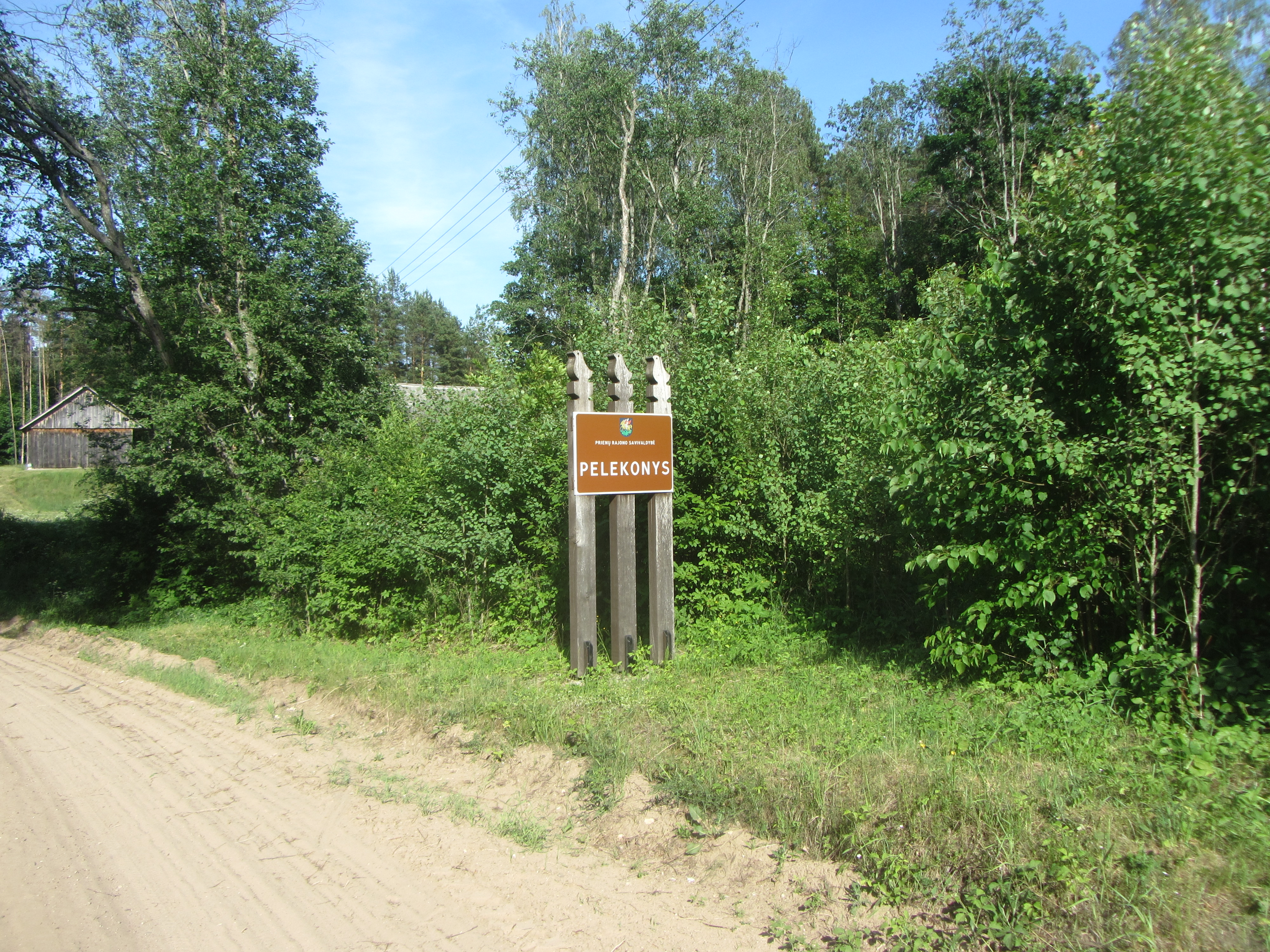 Jiezno sen., Lithuania